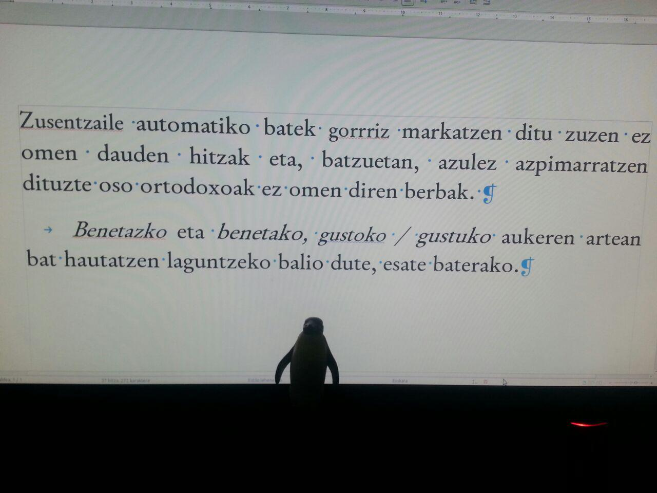 Zuzentzaile automatikoa_Hobelex_urrutitik